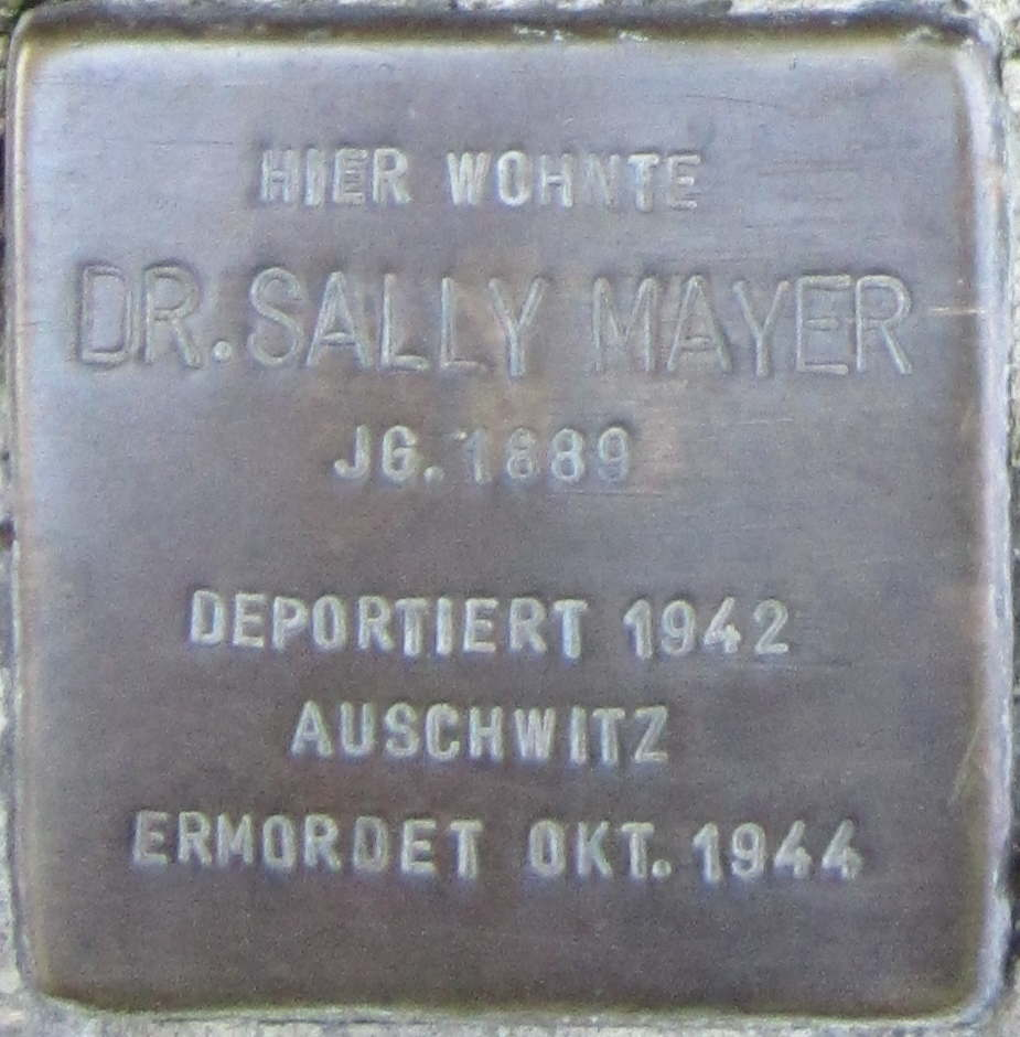 Konradstraße 7, Würzburg, Germany Hier wohnte Heinrich Klein, Jg. 1898, deportiert 1941, Riga, ermordet